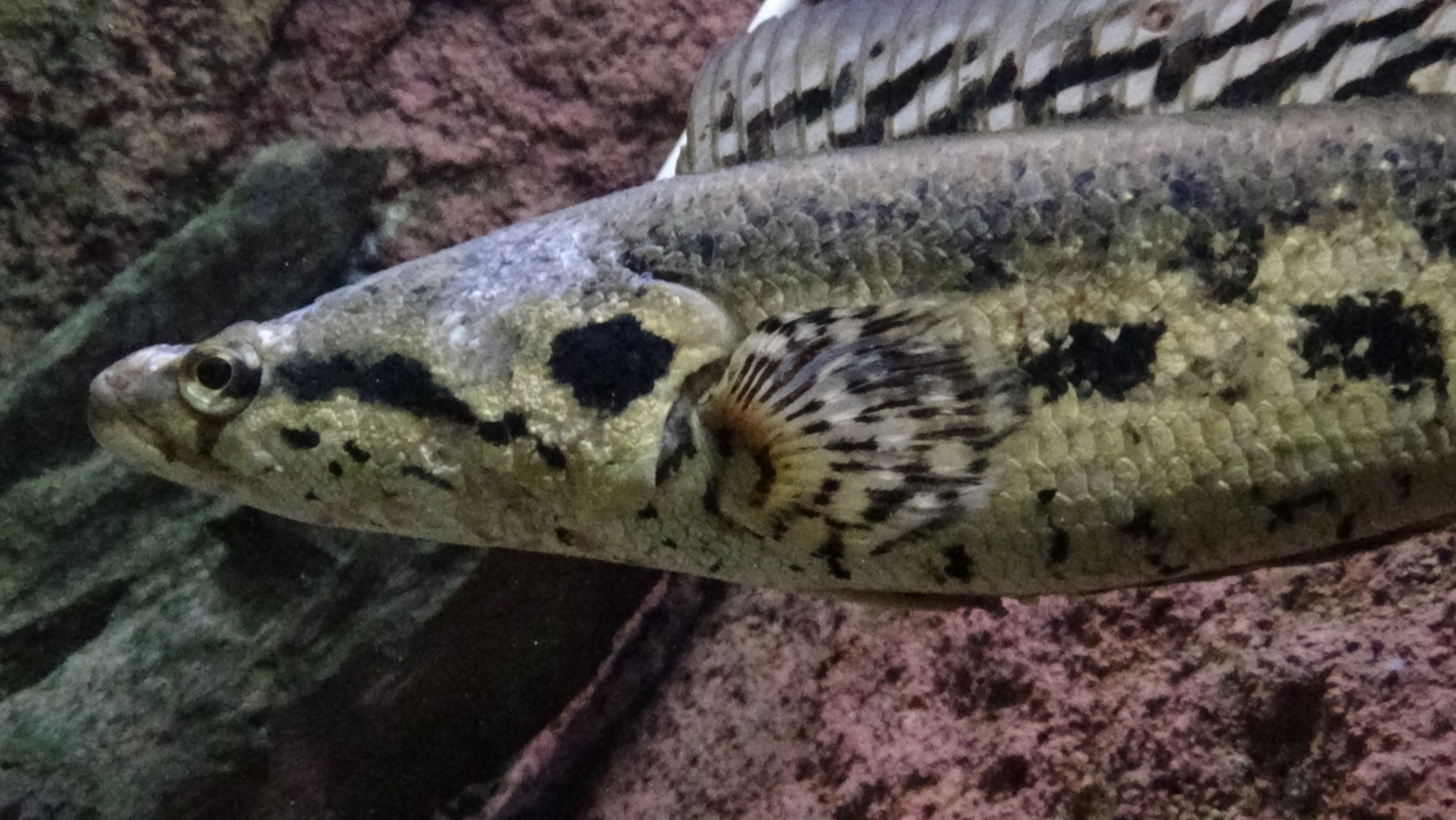 Parachanna obscura - Aquarium Tropicale du palais de la Porte Dorée, Paris, Ile de France, France - 12/2014